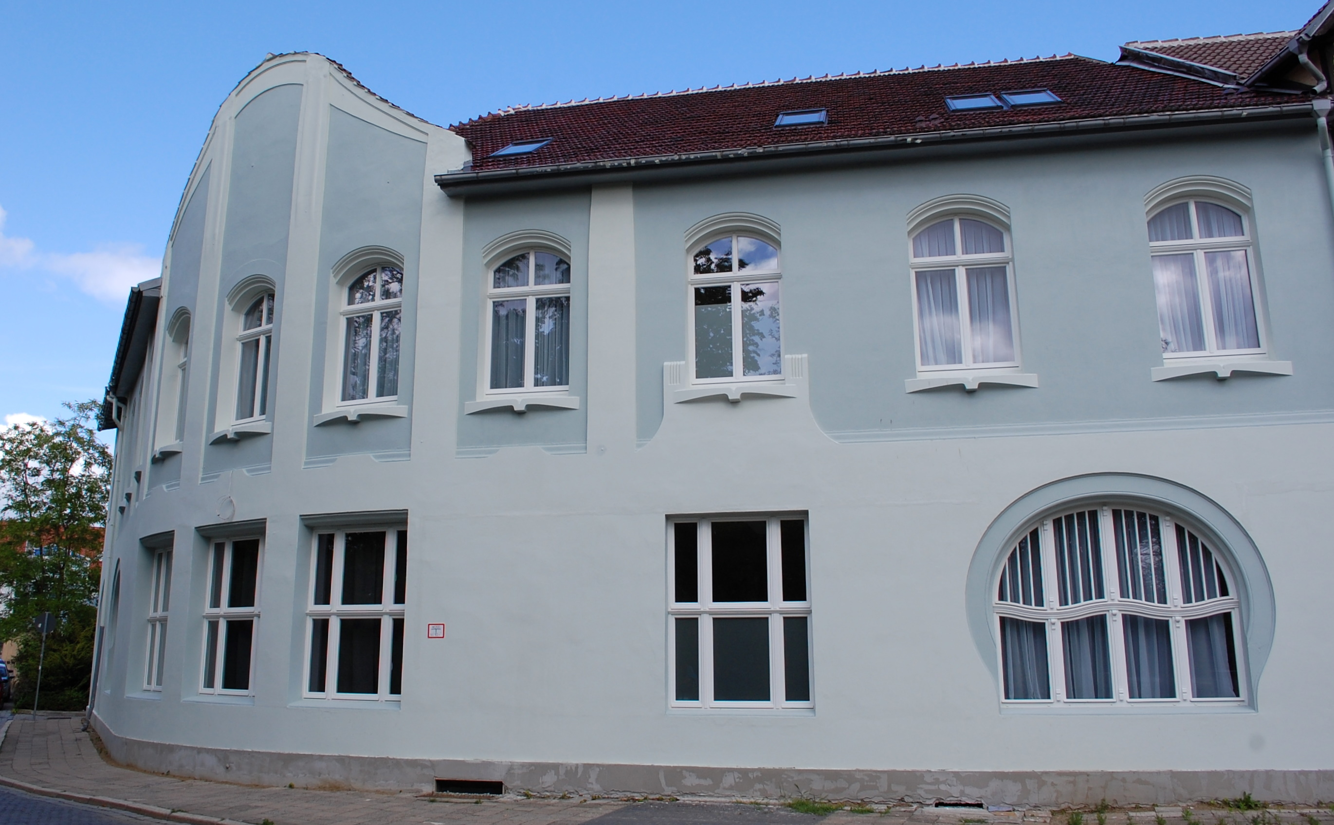 Teil des Hauses Adelheidstraße 1 in Quedlinburg